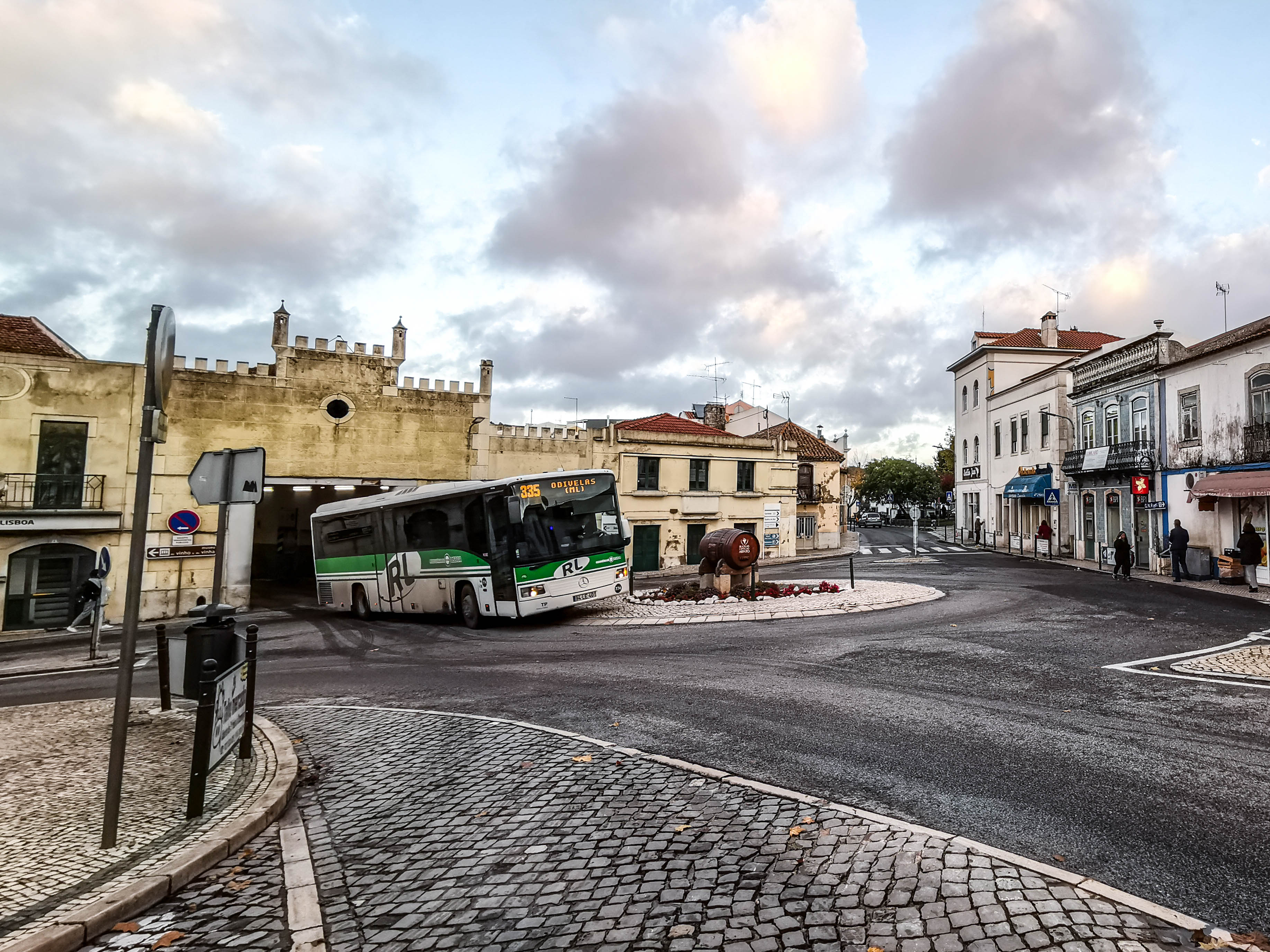 Autocarro da Rodoviária de Lisboa à saída do Terminal Rodoviário de Bucelas.